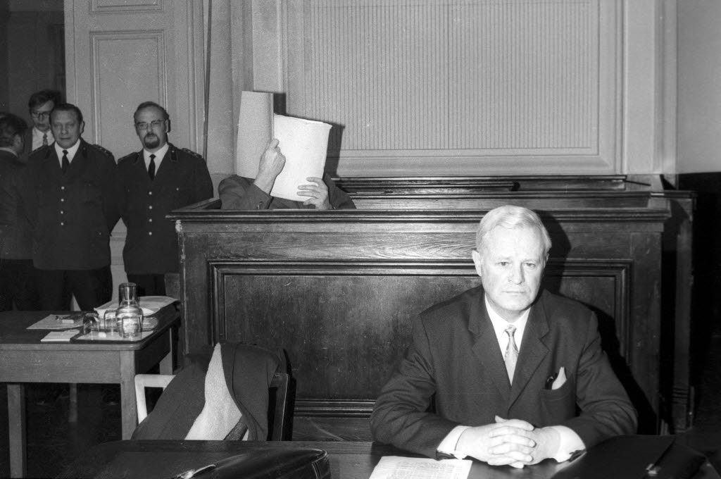 Hinten mit verdecktem Gesicht der angeklagte Oberregierungsrat a.D. Heinz Richter, ehemaliger SS-Obersturmbannführer, vorn der angeklagte Geschäftsführer Wilhelm Nickel, ehemaliger SS-Obersturmführer. Ihnen wird vorgeworfen, im Januar 1945 den Befehl zur Erschießung von 600 Häftlingen des Zuchthauses Sonnenberg bei Frankfurt (Oder) weitergegeben bzw. durchgeführt zu haben. Der Prozess wird 1971 fortgesetzt.